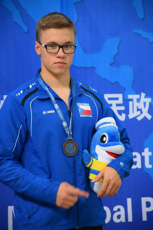 Jakub Jarolím